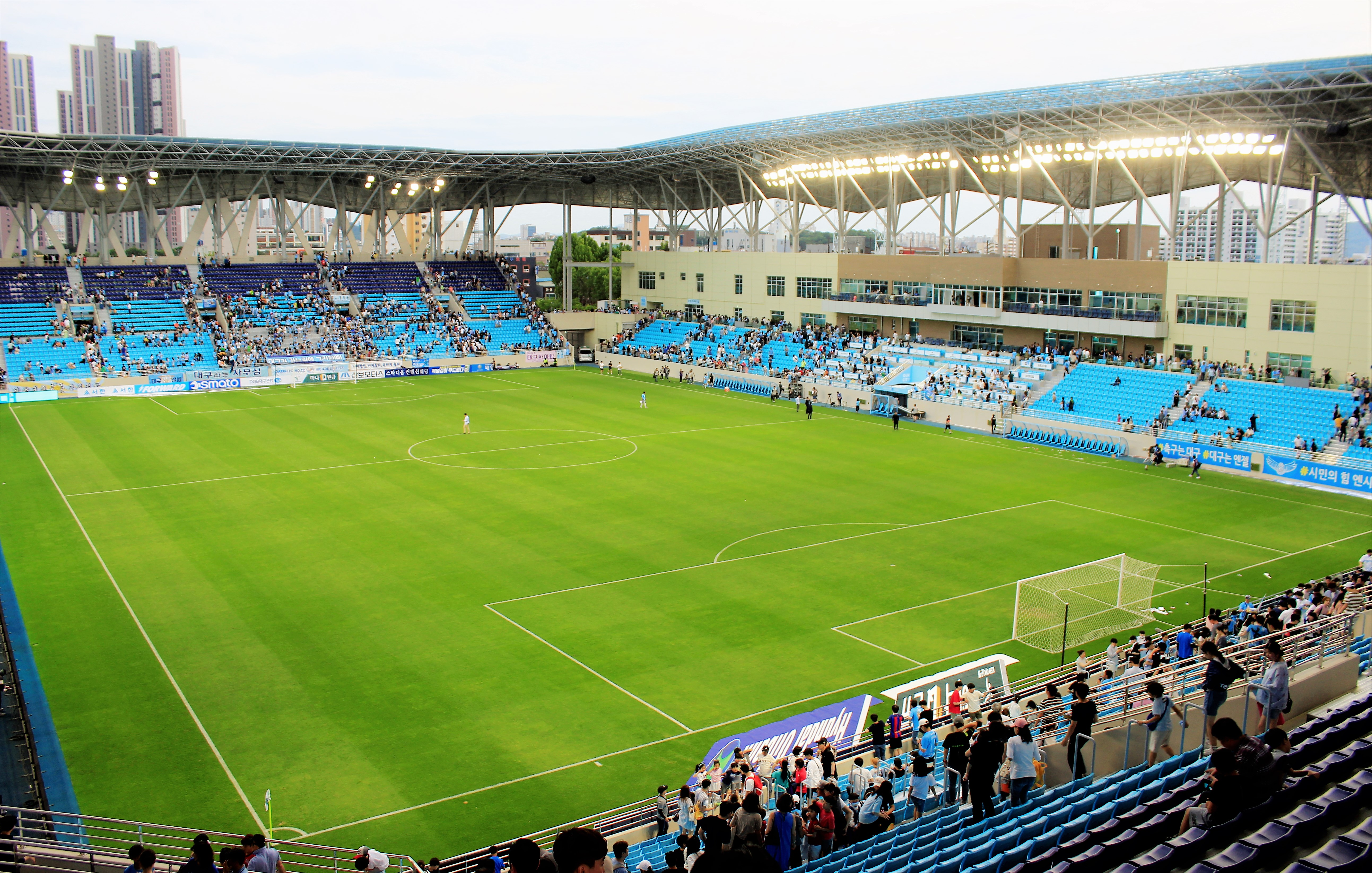 2019년의 대구 DGB은행파크의 모습.